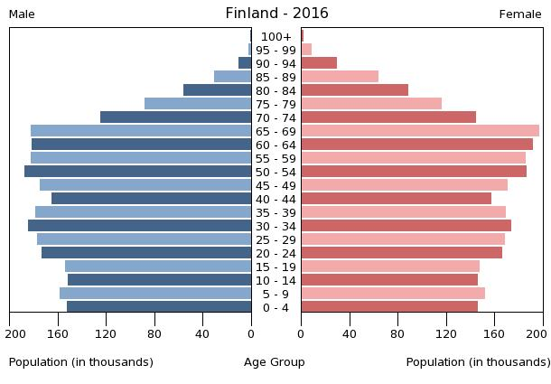 A population pyramid illustrates the age and sex structure of a country's population and may provide insights about political and social stability, as well as economic development. The population is distributed along the horizontal axis, with males shown on the left and females on the right. The male and female populations are broken down into 5-year age groups represented as horizontal bars along the vertical axis, with the youngest age groups at the bottom and the oldest at the top. The shape of the population pyramid gradually evolves over time based on fertility, mortality, and international migration trends.